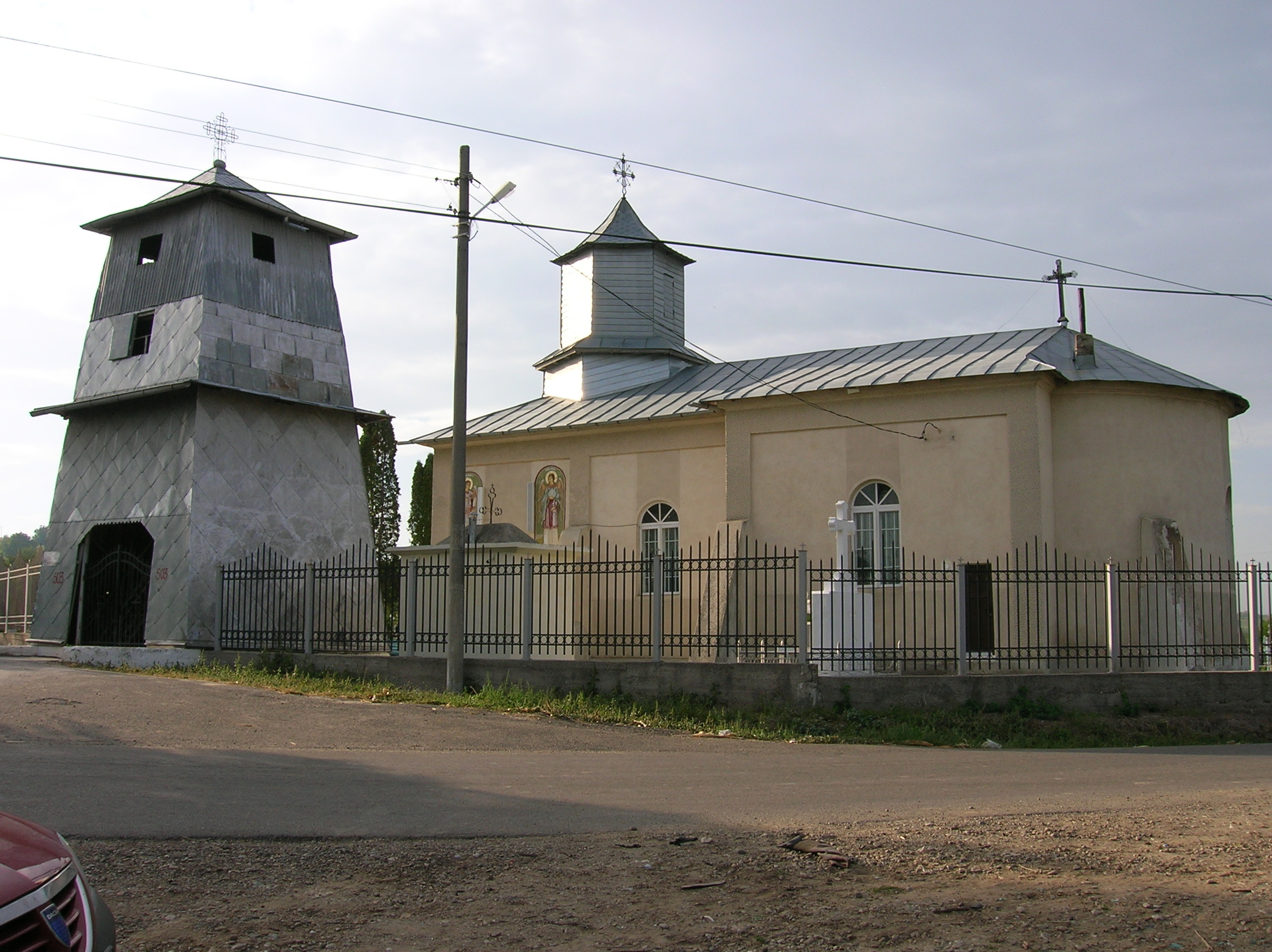 Comuna Valea Seacă Bacău - Satul Valea Seacă - Biserica Sfinţii Mihail şi Gavril